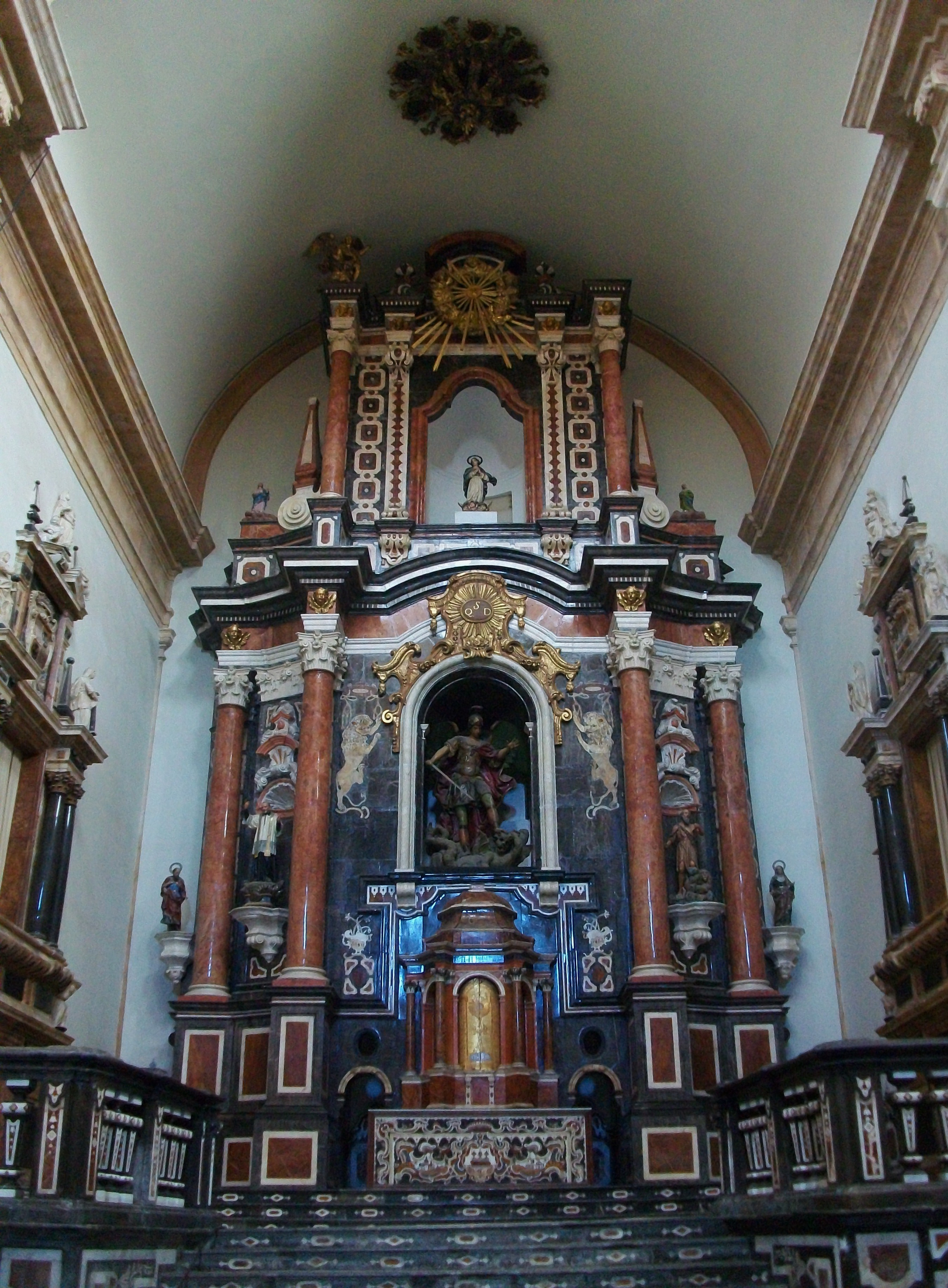 Altar de l'església de sant Miquel dels Reis.